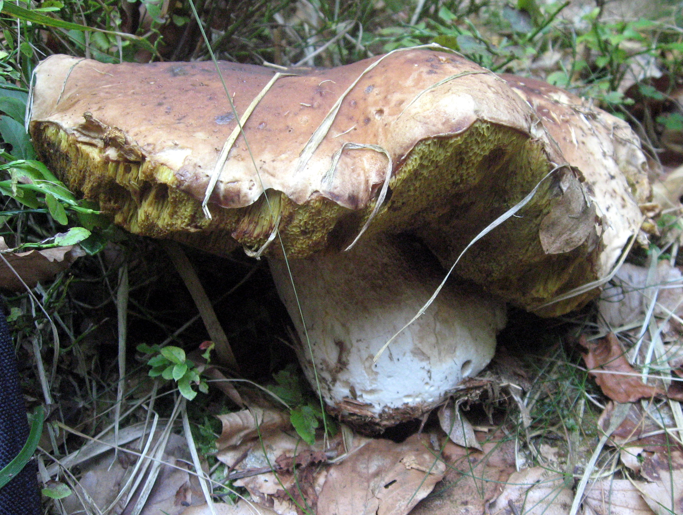 Hřib smrkový